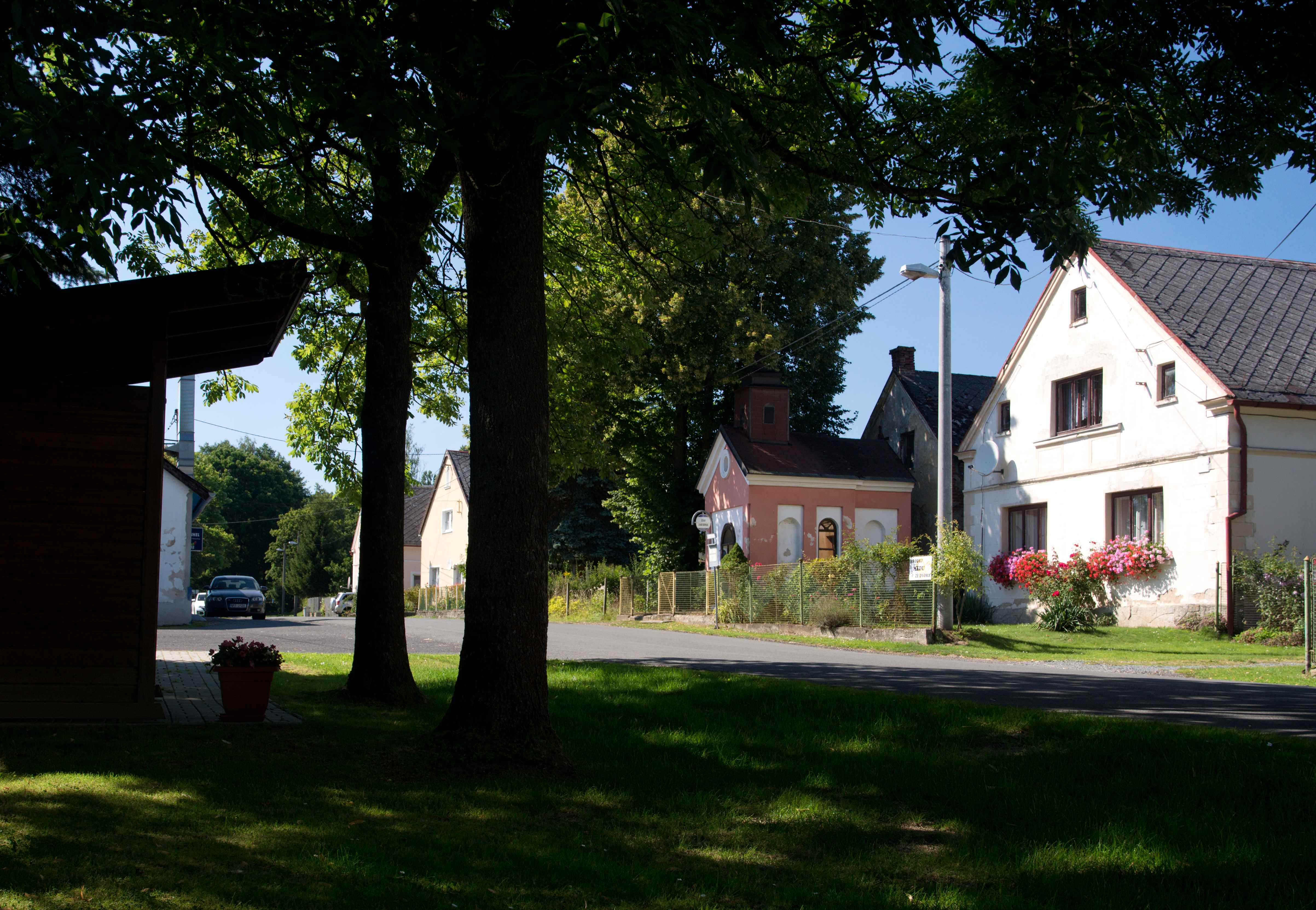 Maršovy Chody Zastávka autobusu, v pozadí kaplička